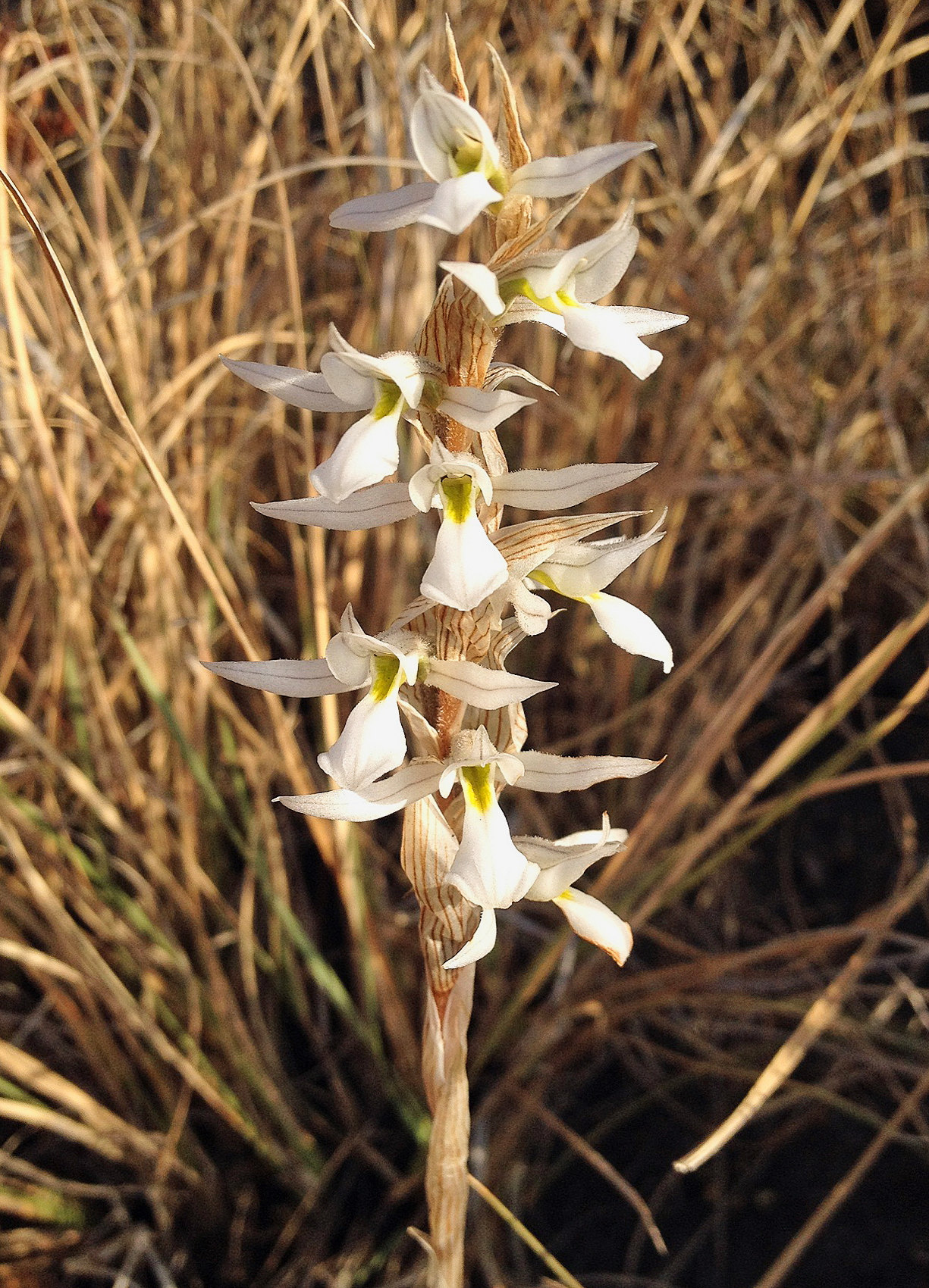 Deiregyne eriophora es una orquídea de hábito terrestre originaria de México y Guatemala. Este ejemplar fue fotografiado en un cerro a las afueras de El Carmen Tequexquitla, Tlaxcala.